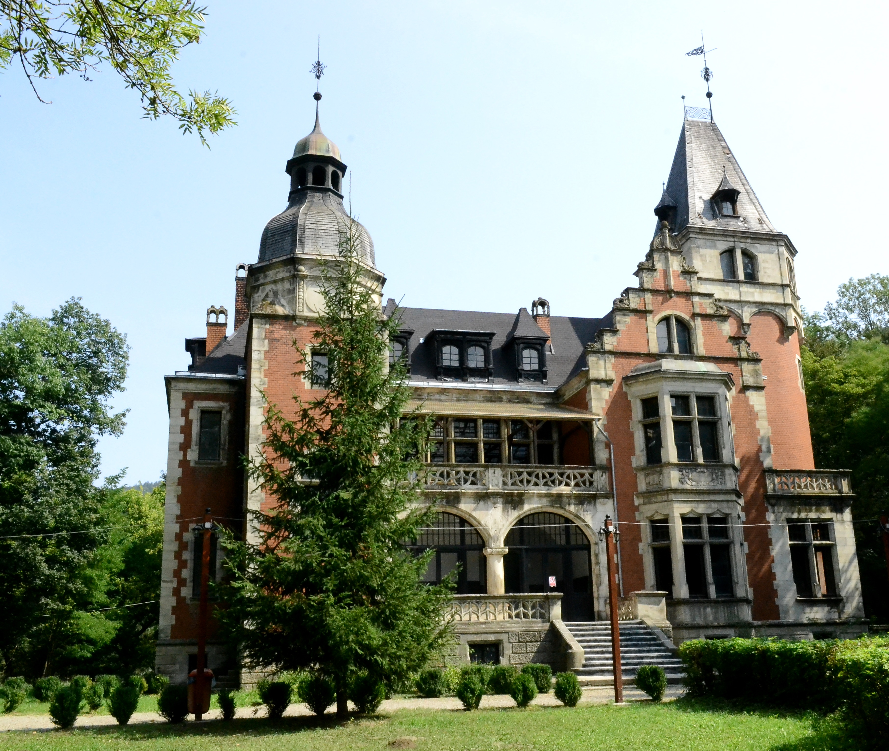 Castel 01